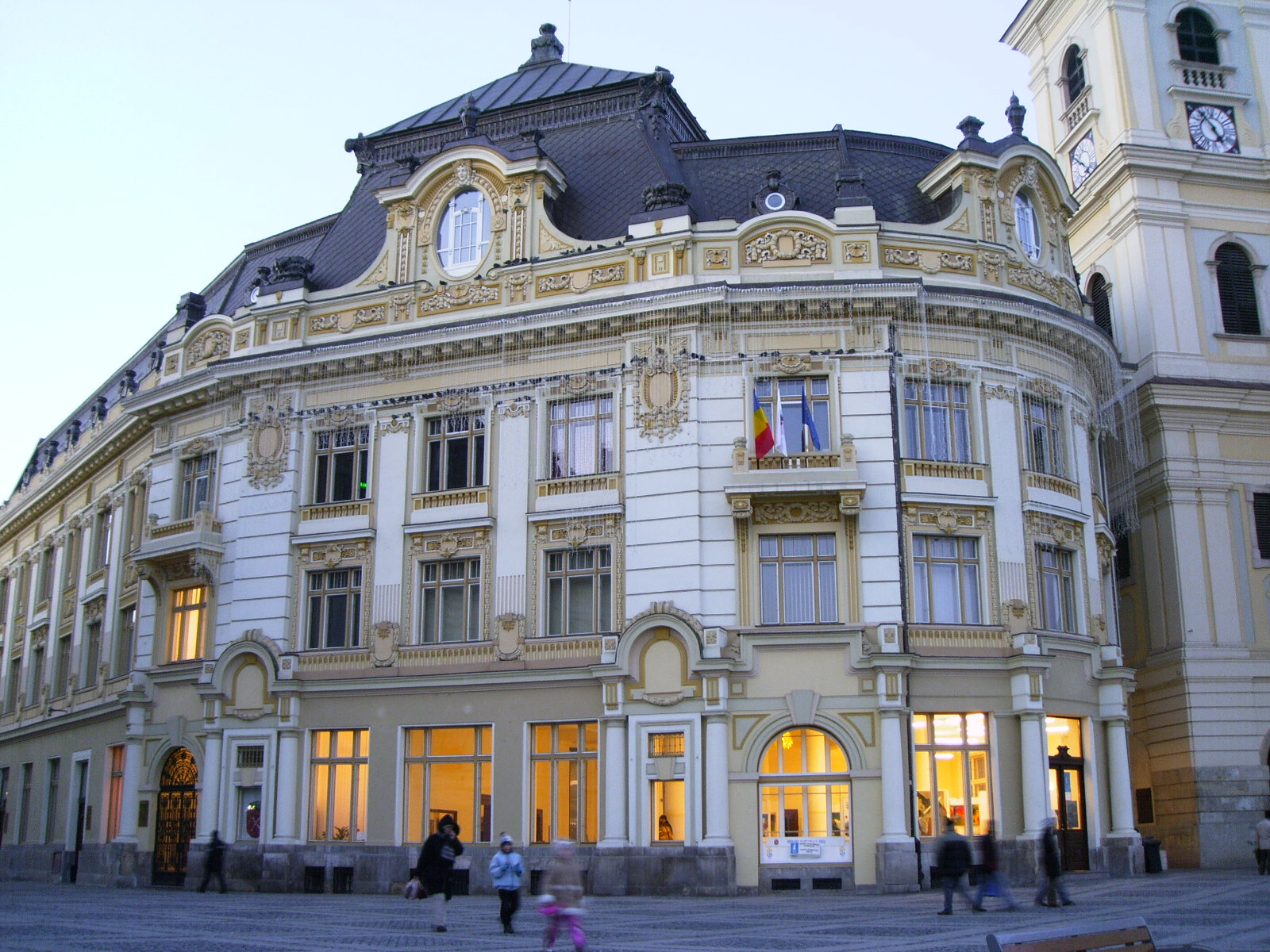 Das Rathaus von Sibiu (Hermannstadt) an der Piaţa Mare.